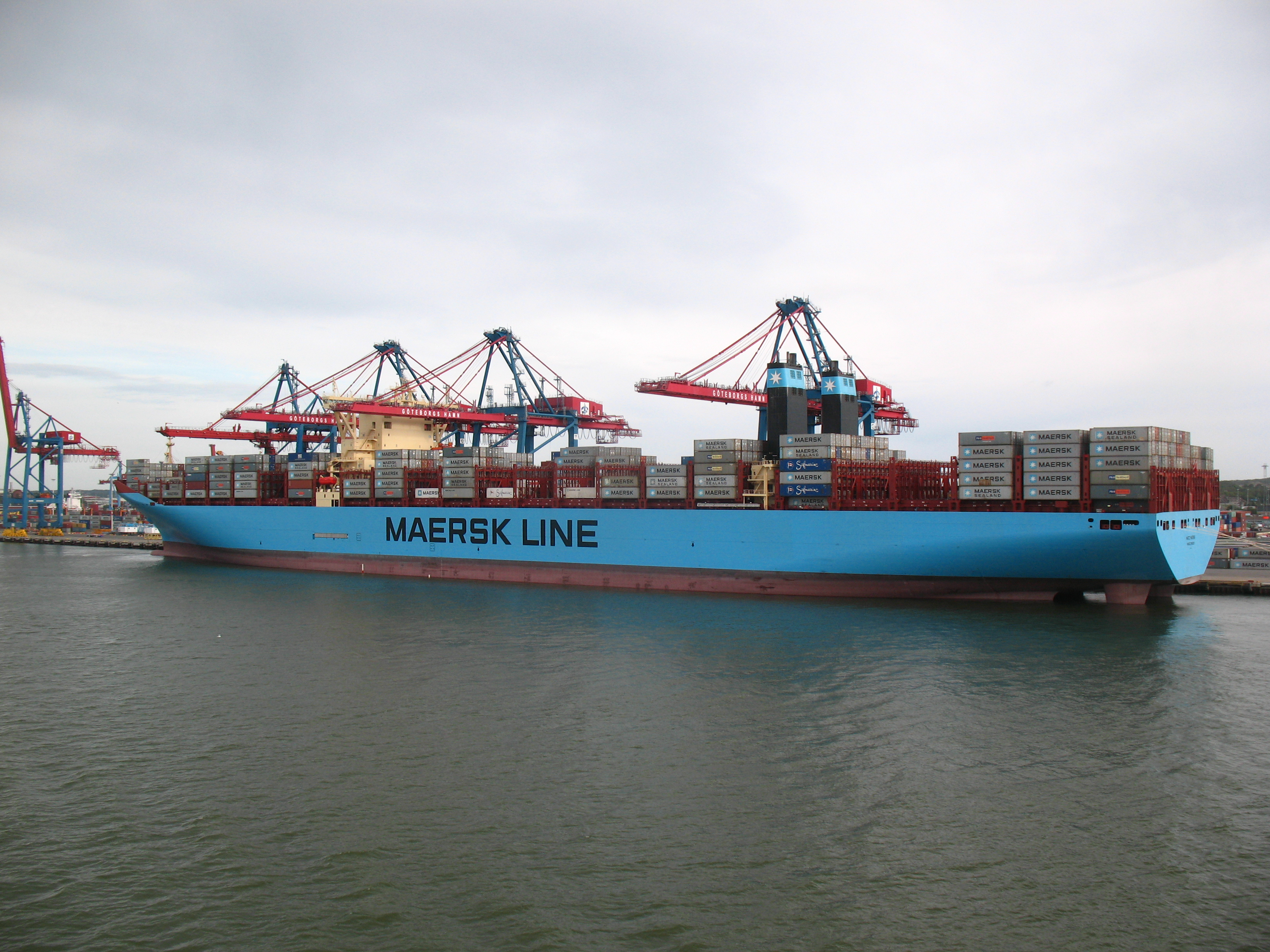 Matz Maersk im Hafen Göteborg